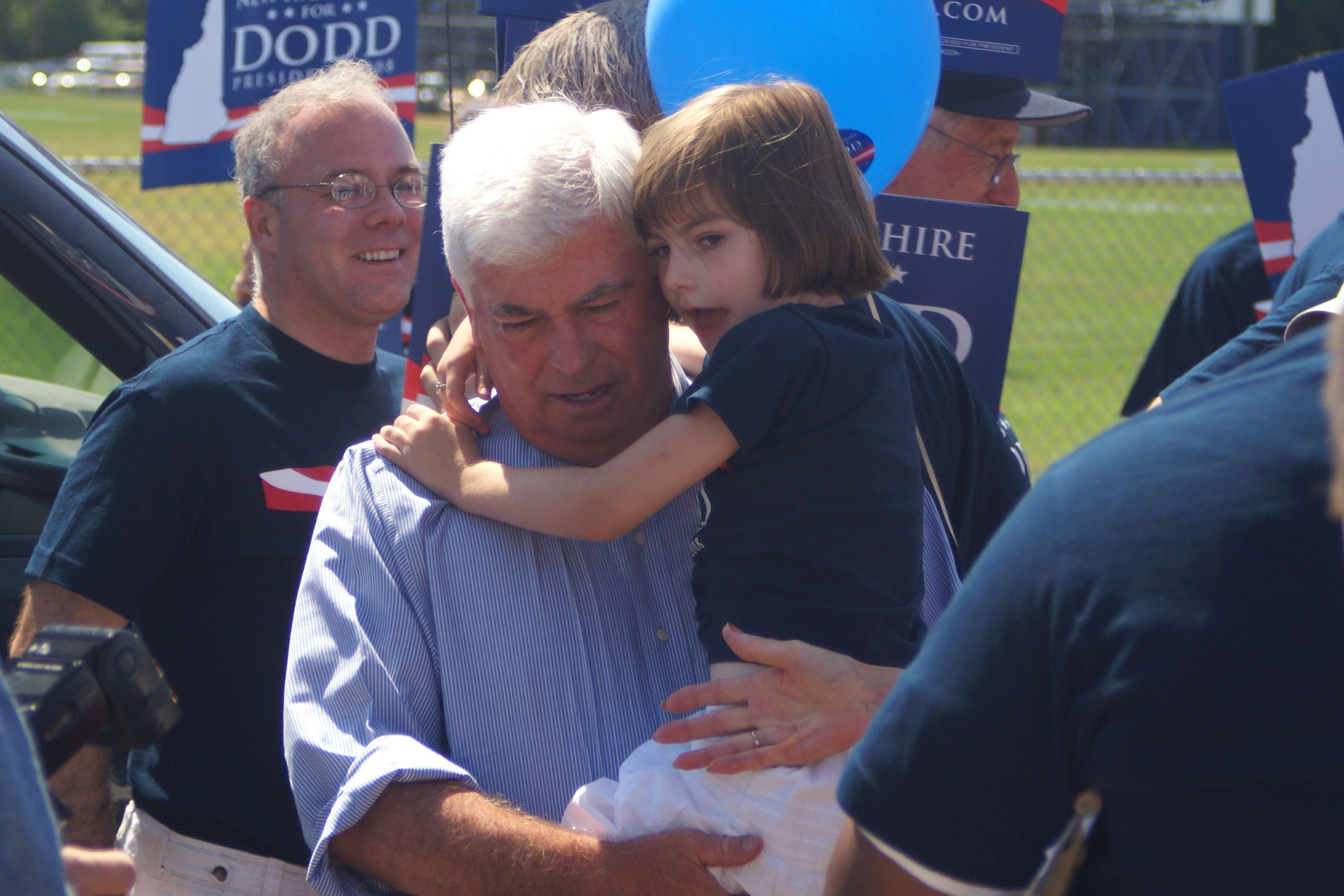 Christopher Dodd & Daughter